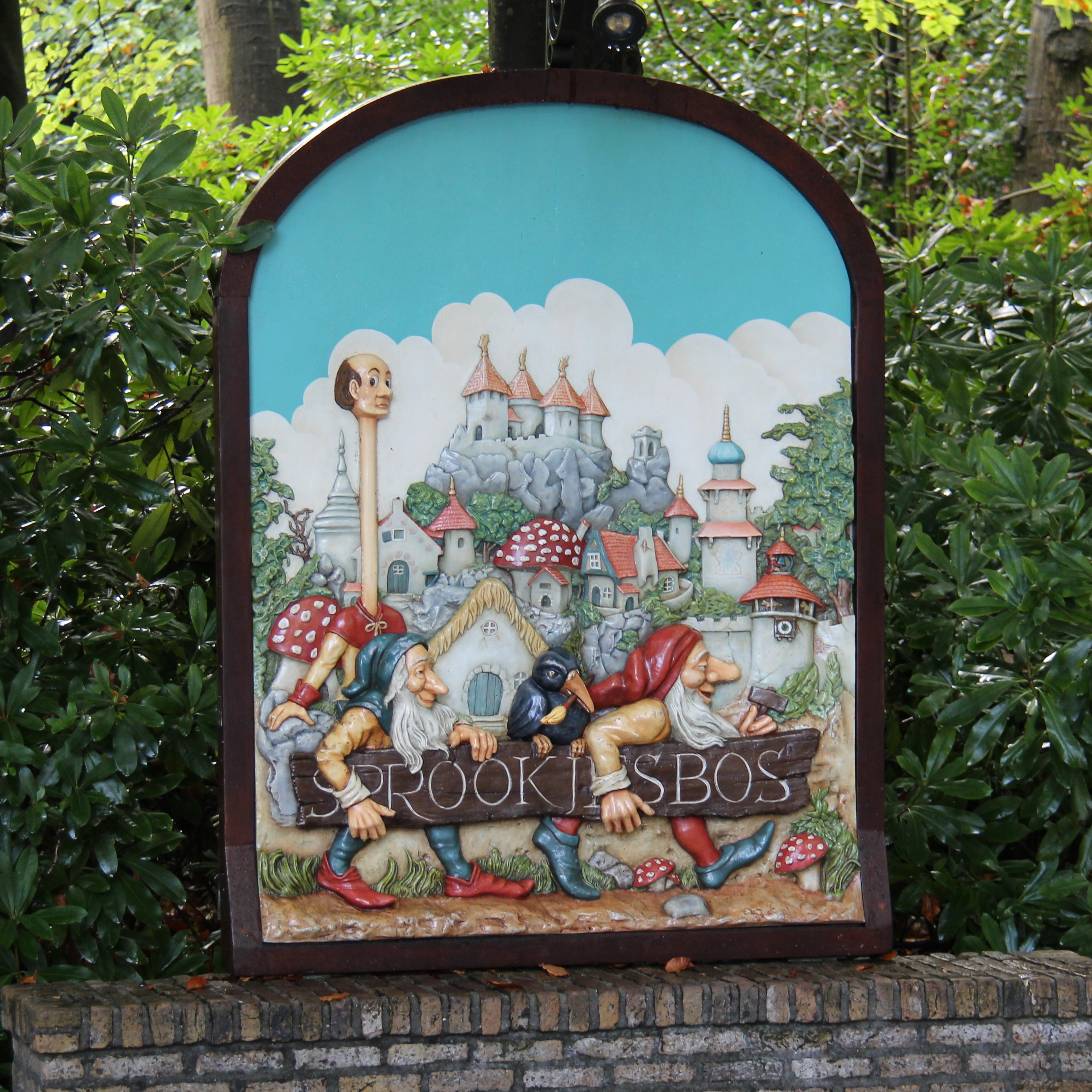 Het bord van het sprookjesbos in de Efteling